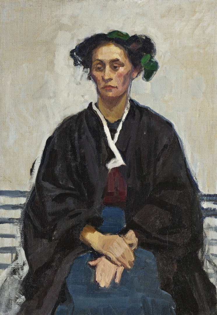 Selbstbildnis